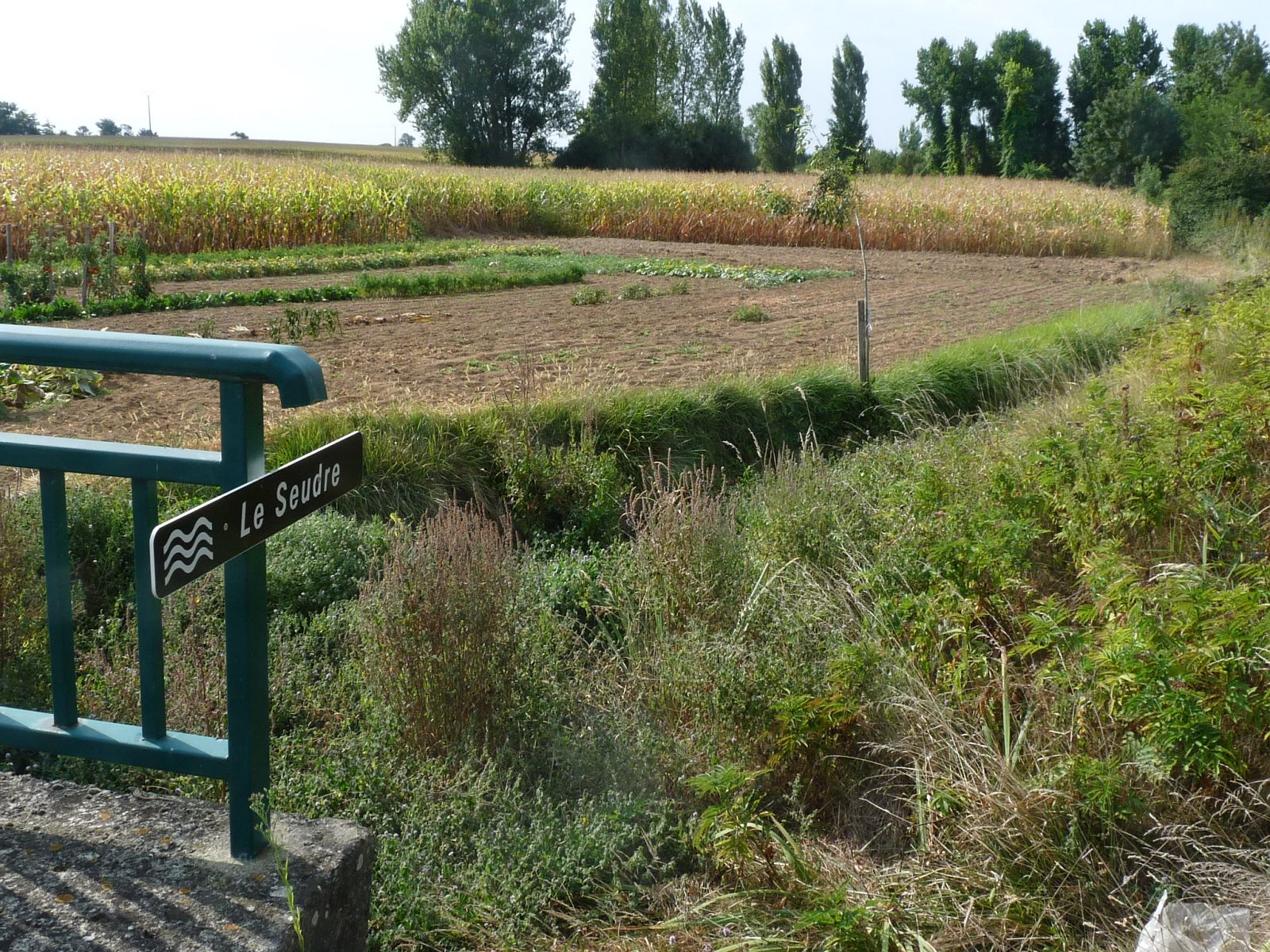 Le Seudre, petit affluent de la Seudre, à St-Germain-du-Seudre (17), France